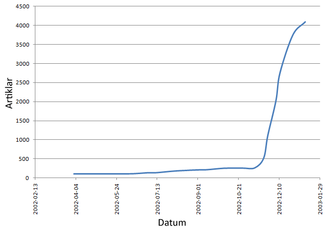 Ökningen av svenska Wikipedia. Bilden skapades av mig i Microsoft Excel och får fritt användas. Data jag använde var (i tabbavgränsat textformat): 2003-01-11 4099 2002-12-27 3765 2002-12-11 2762 2002-12-06 2027 2002-11-26 1116 2002-11-21 523 2002-11-10 265 2002-10-26 259 2002-10-03 255 2002-09-13 218 2002-08-31 211 2002-08-04 183 2002-07-13 140 2002-07-01 136 2002-06-13 111 2002-05-27 108 2002-05-10 106 2002-05-01 106 2002-04-02 106